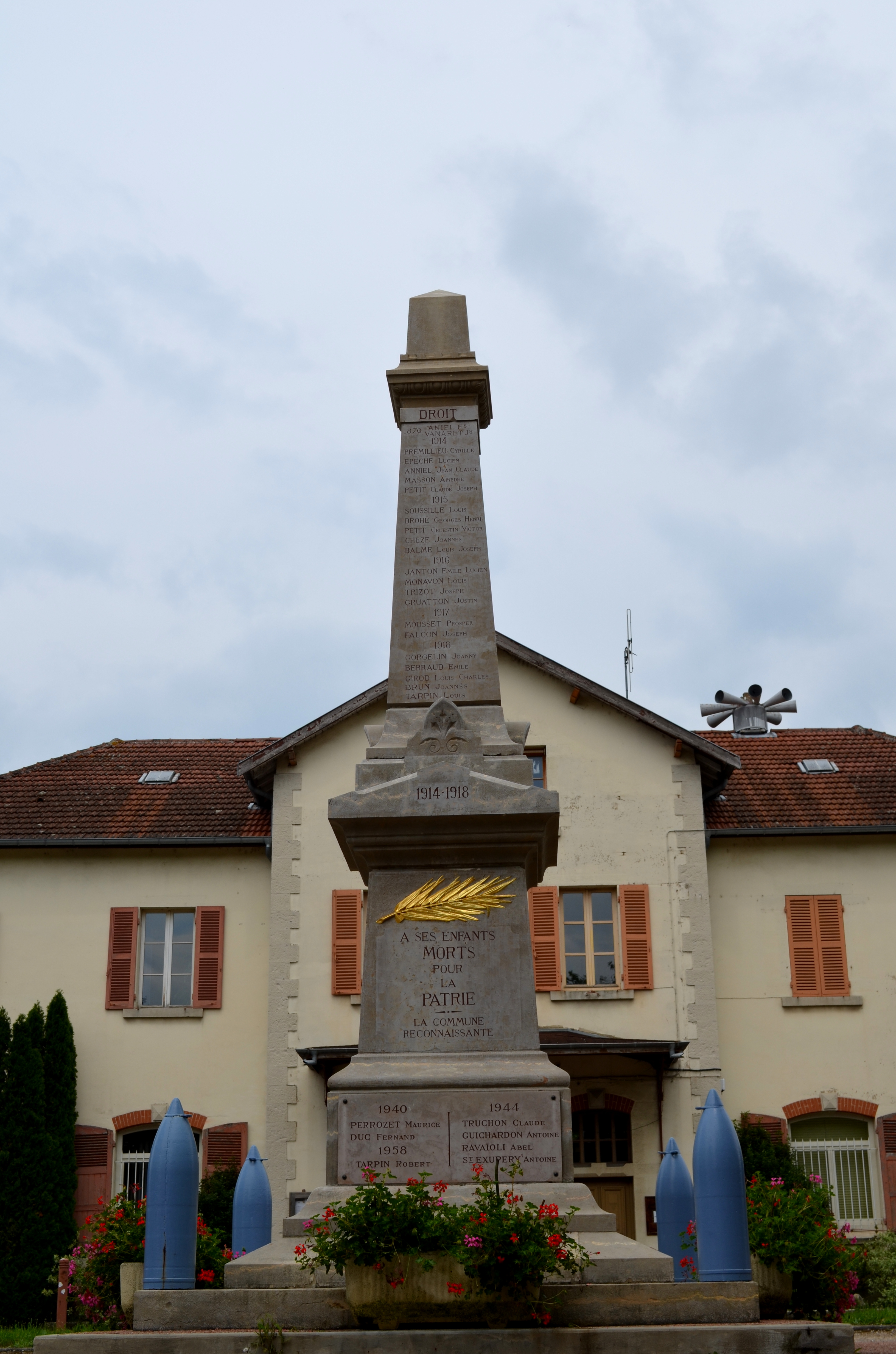 Mairie et monument au mort de Saint-Maurice-de-Rémens.